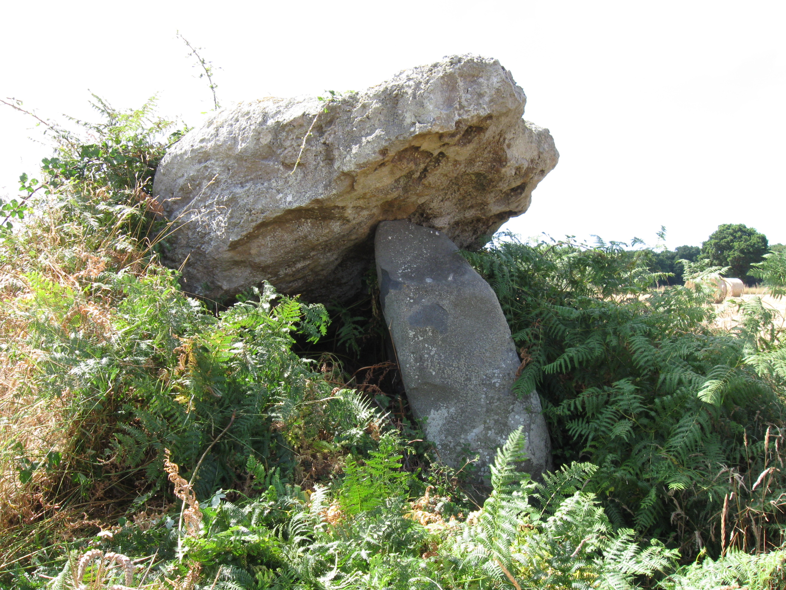 Dolmen dit de la Ville-Tinguy. (commune de Trégon, département des Côtes-d'Armor, région Bretagne).